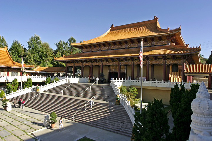 Hsi Lai Temple